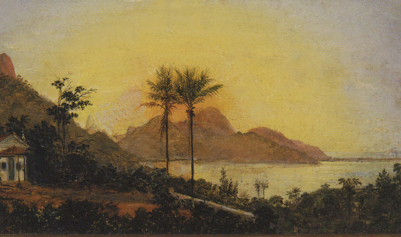 Pintura de Nicolau Antonio Facchinetti, de 1879, com a capelinha e a Lagoa Rodrigo de Freitas ao fundo. 1879. Acervo Museu Imperial, Petrópolis, RJ. Disponível em